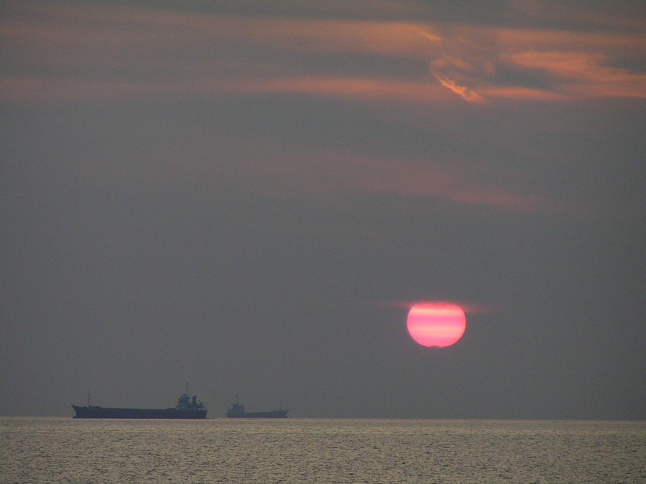 明石海峡に沈む夕日